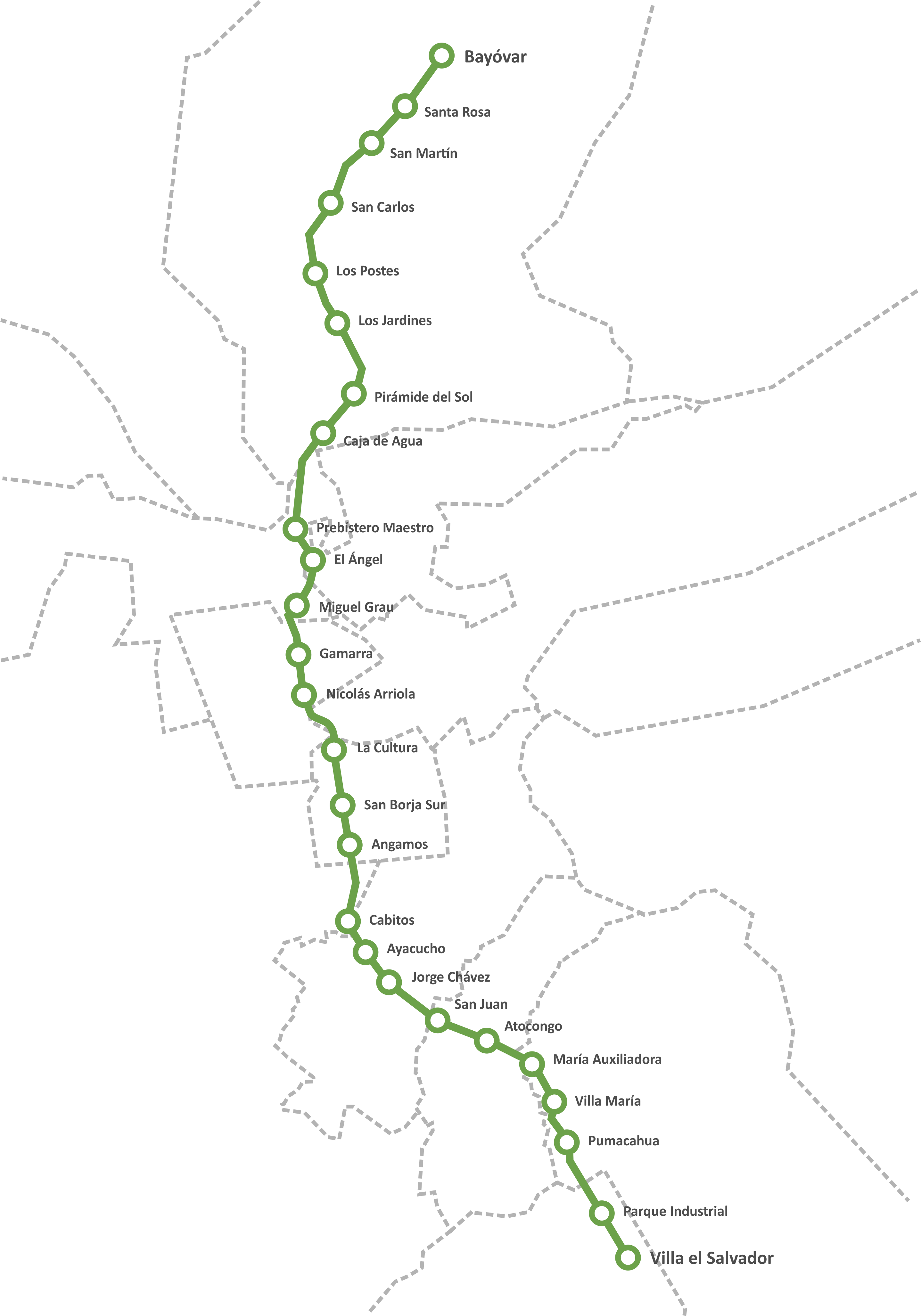 Mapa de Línea 1